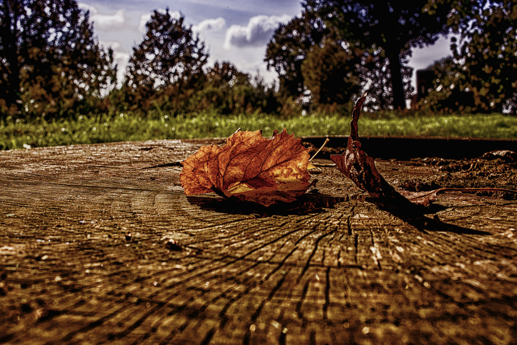 Oasi di riequilibrio ecologico del "Torrazzolo" This is a photo of a monument which is part of cultural heritage of Italy.